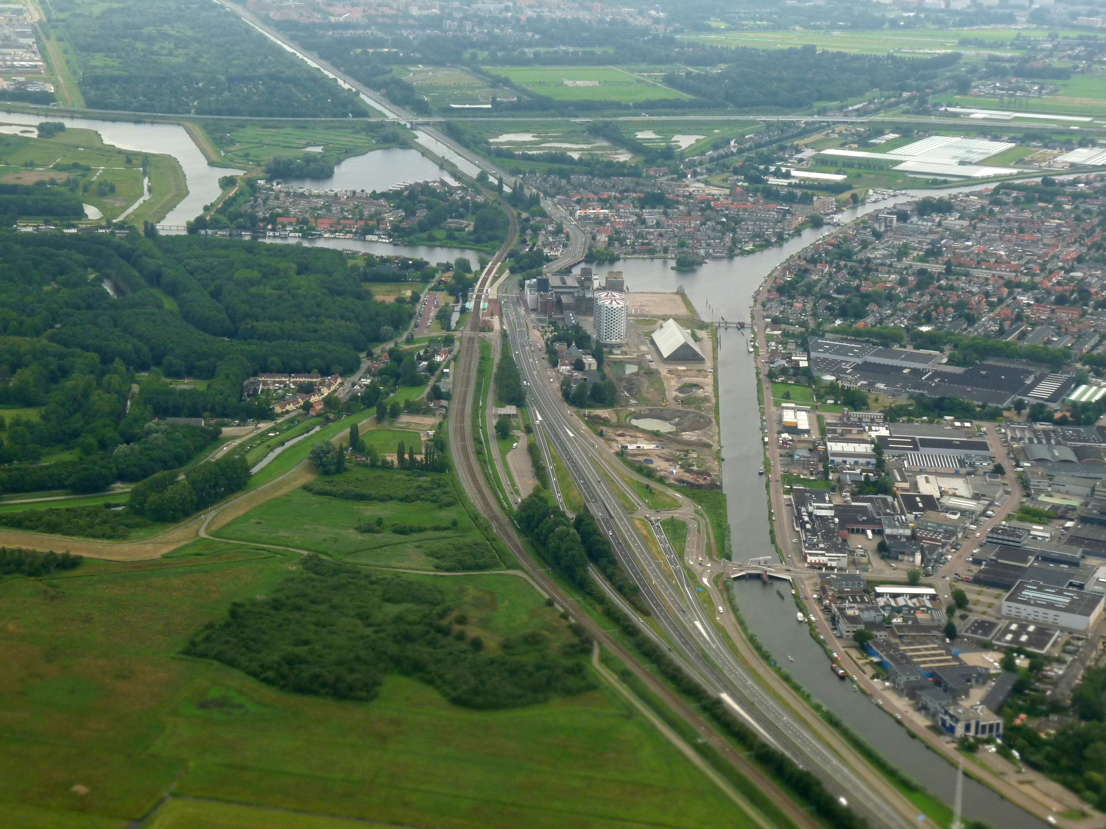 Halfweg en Zwanenburg gezien vanaf het vliegtuig; midden op de foto de Boezembrug